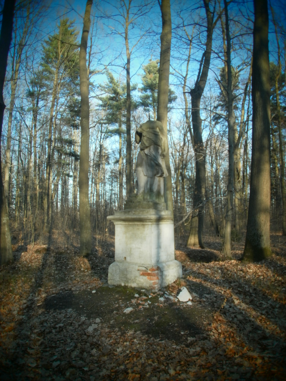 park pałacowy Pokój, Pokój 01.1985.